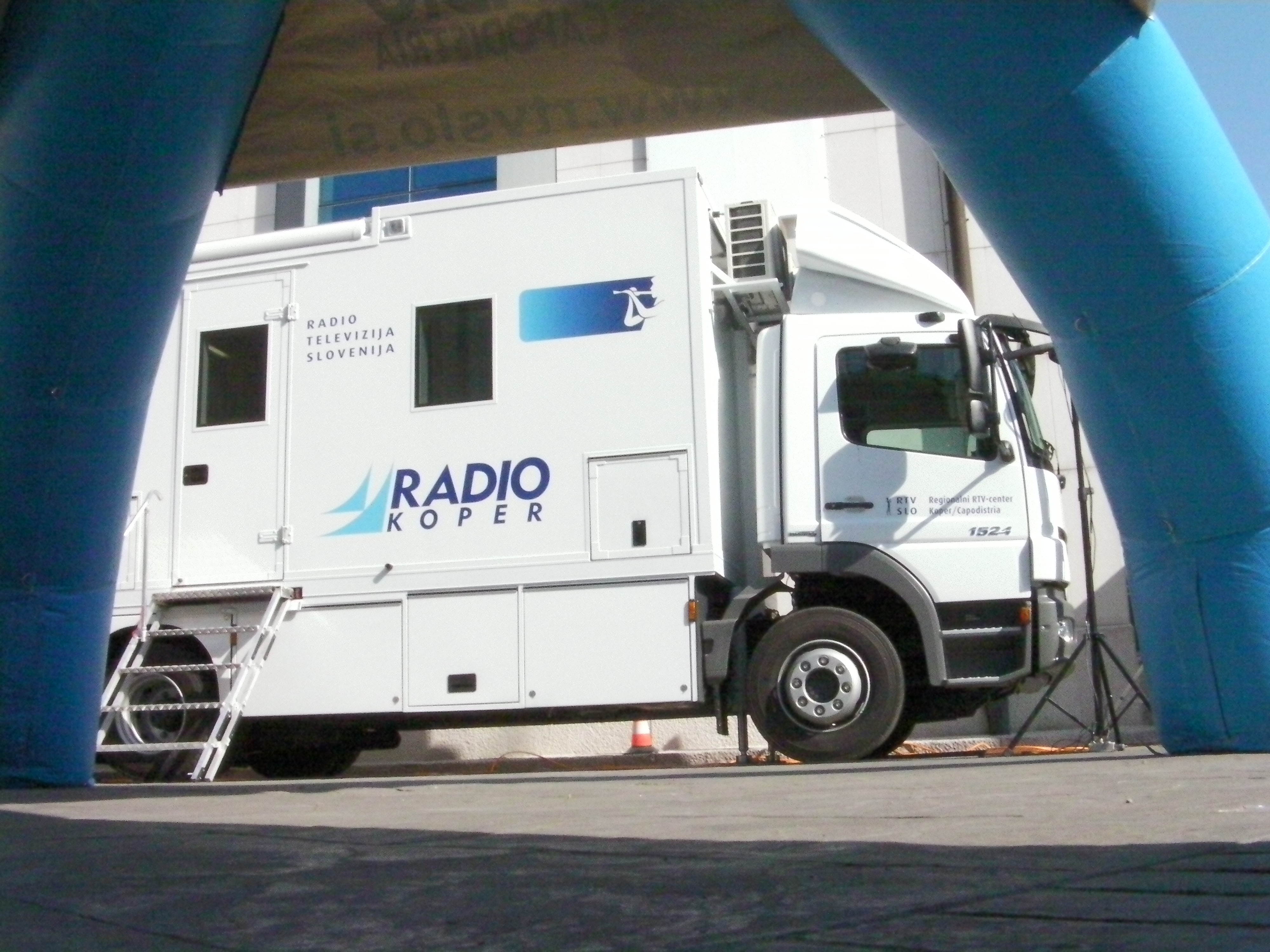 Reportažno vozilo RA3